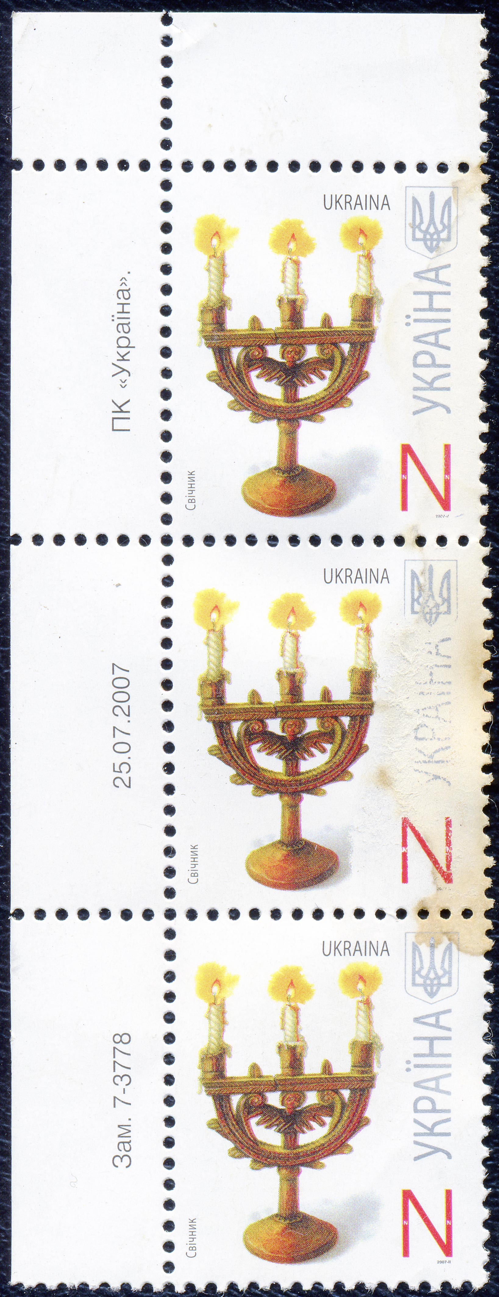 Марка Украины. Подсвечник